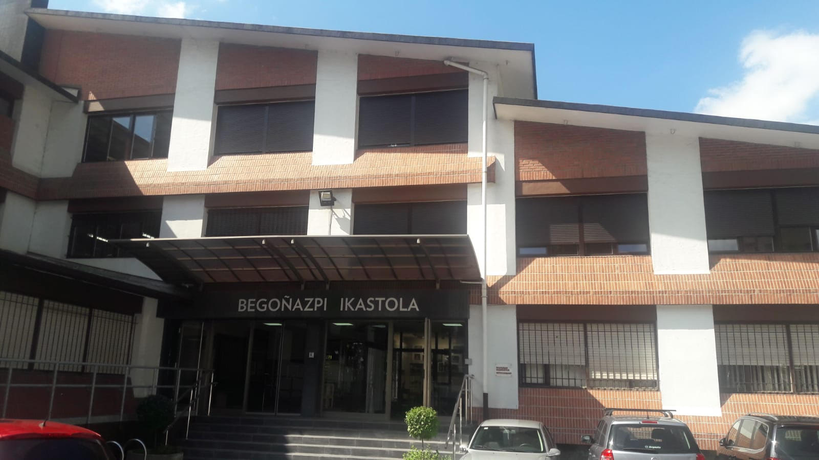 Begoñazpi ikastolaren argazkia